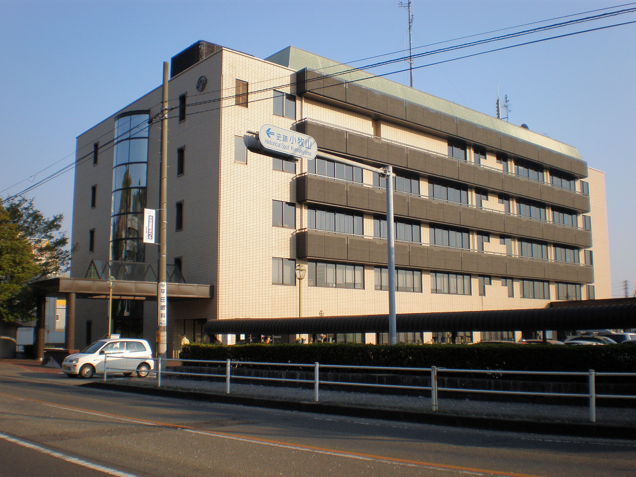 愛知県小牧市にある小牧市役所（南庁舎）